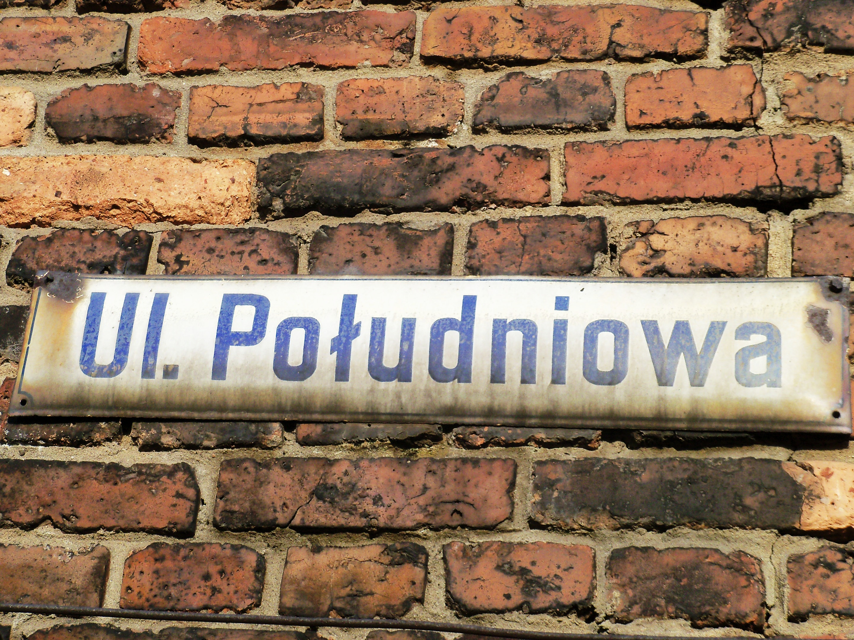 Huta Baildon w Katowicach - tabliczka z nazwą jednej z dawnych ulic zakładowych